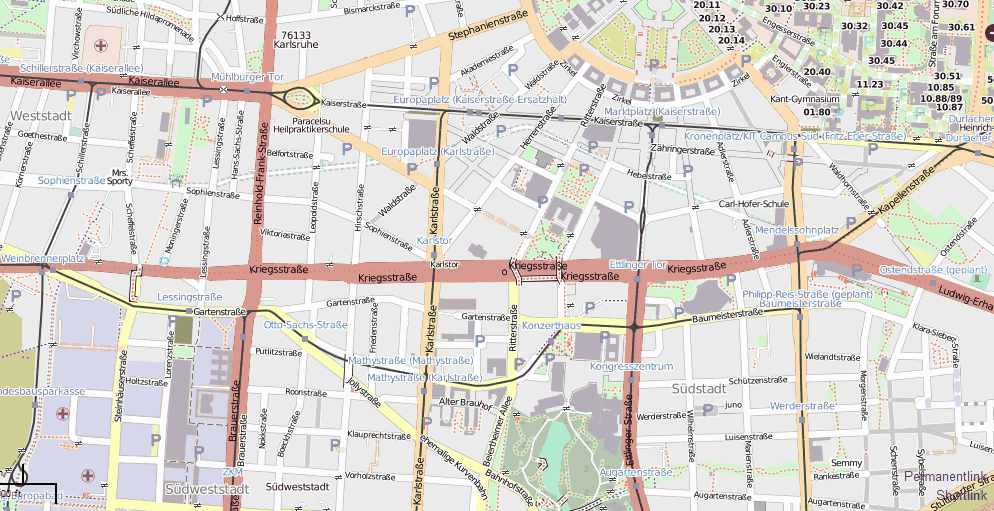 innere Stadt Karlsruhe, Bankraubserie Nordbaden/Südpfalz